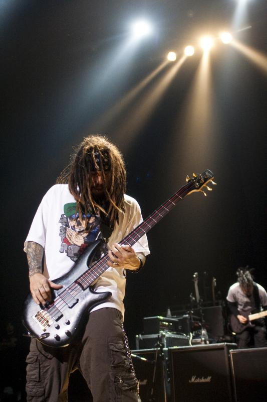 Korn Live @ Credicard Hall - 21/04/2010 - São Paulo, Brasil É proibida a cópia ou reprodução deste material sem a autorização do autor. Por favor, não publique nada daqui sem o devido crédito. Fotógrafo: Alexandre Cardoso